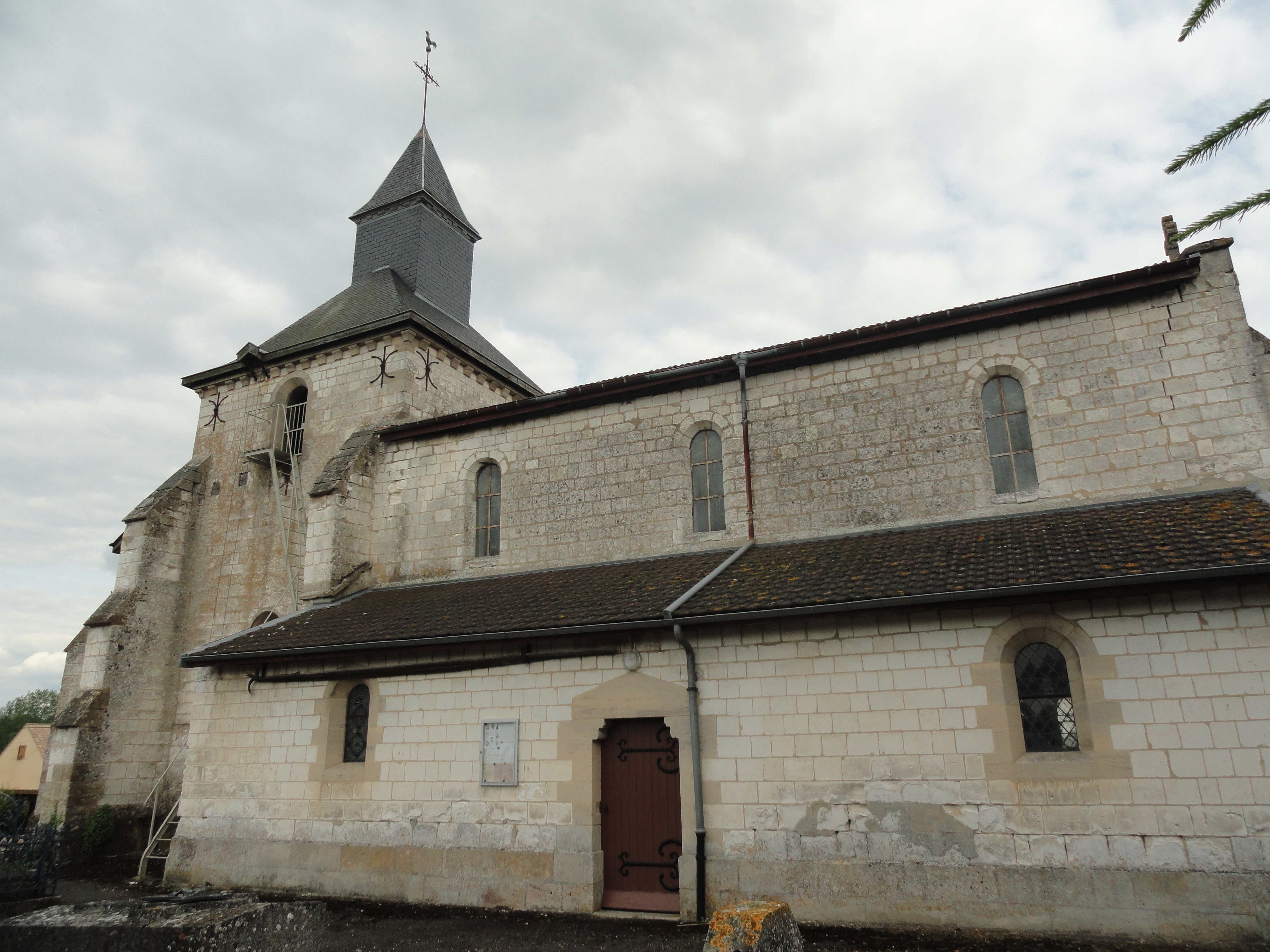 L'église Saint-Hilaire de Drouilly (51).